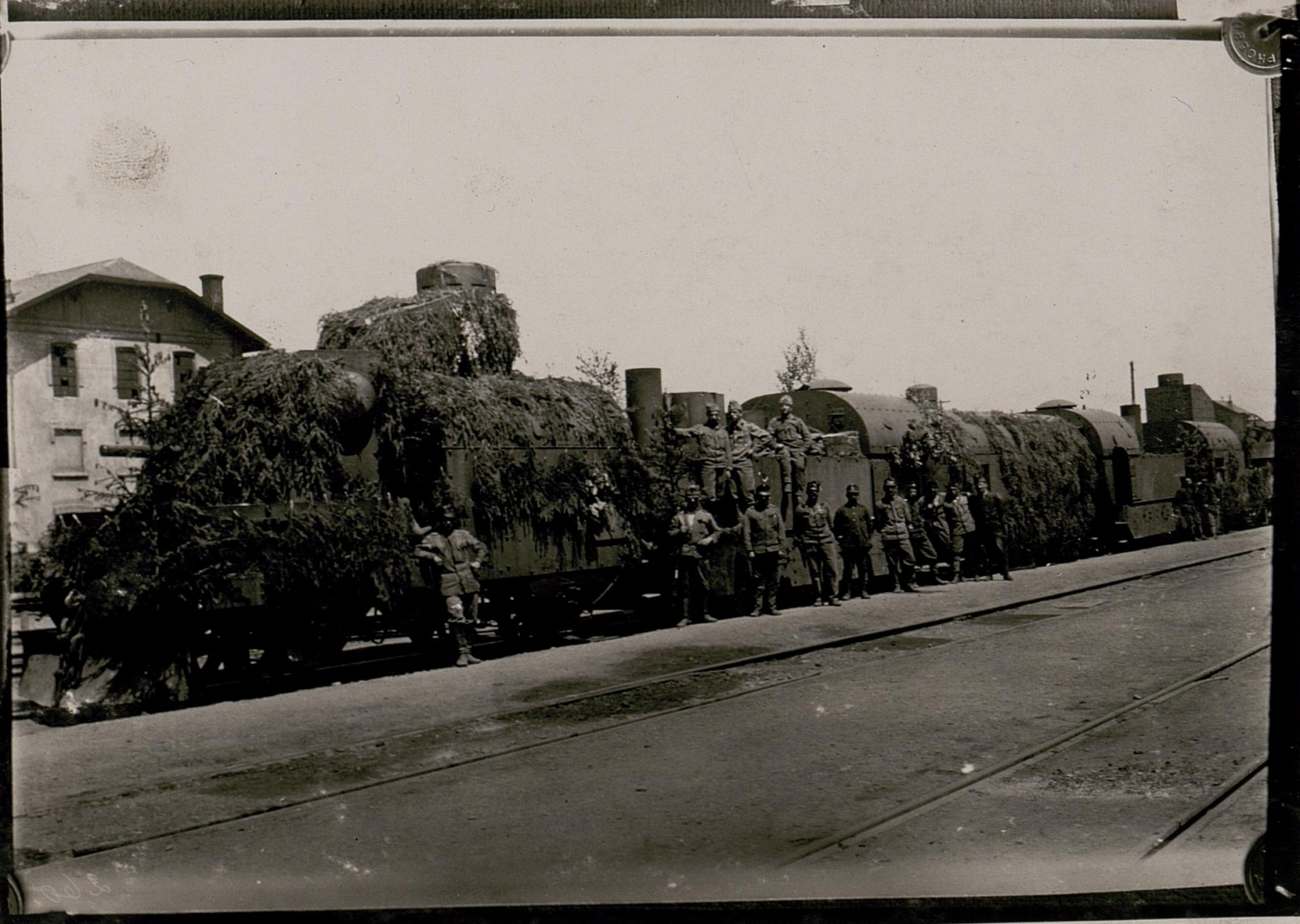 Österreichisch-ungarischer.Panzerzug Nr.VIII. (Stryj)